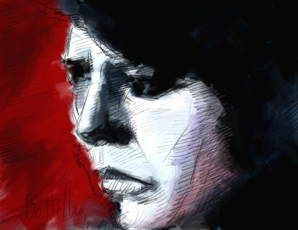 Natália Correia por Bottelho. Natália de Oliveira Correia (Fajã de Baixo, São Miguel, 13 de Setembro de 1923 — Lisboa, 16 de Março de 1993) foi uma intelectual, poetisa e activista social açoriana,Correia (Fajã de Baixo, São Miguel, 13 de Setembro de 1923 — Lisboa, 16 de Março de 1993) foi uma intelectual, poetisa e activista social açoriana